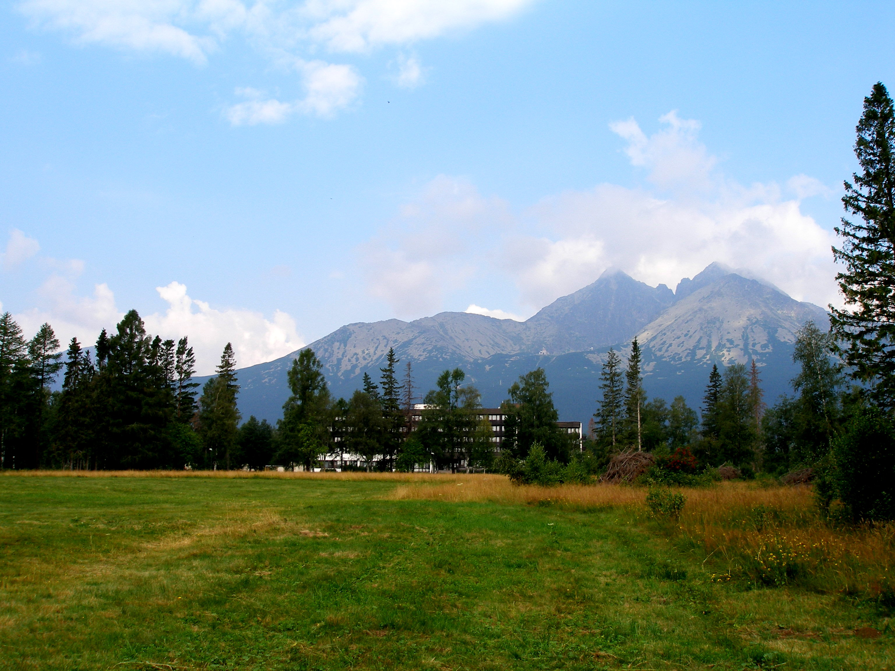 Osada Tatranské Matliare, Slovakia